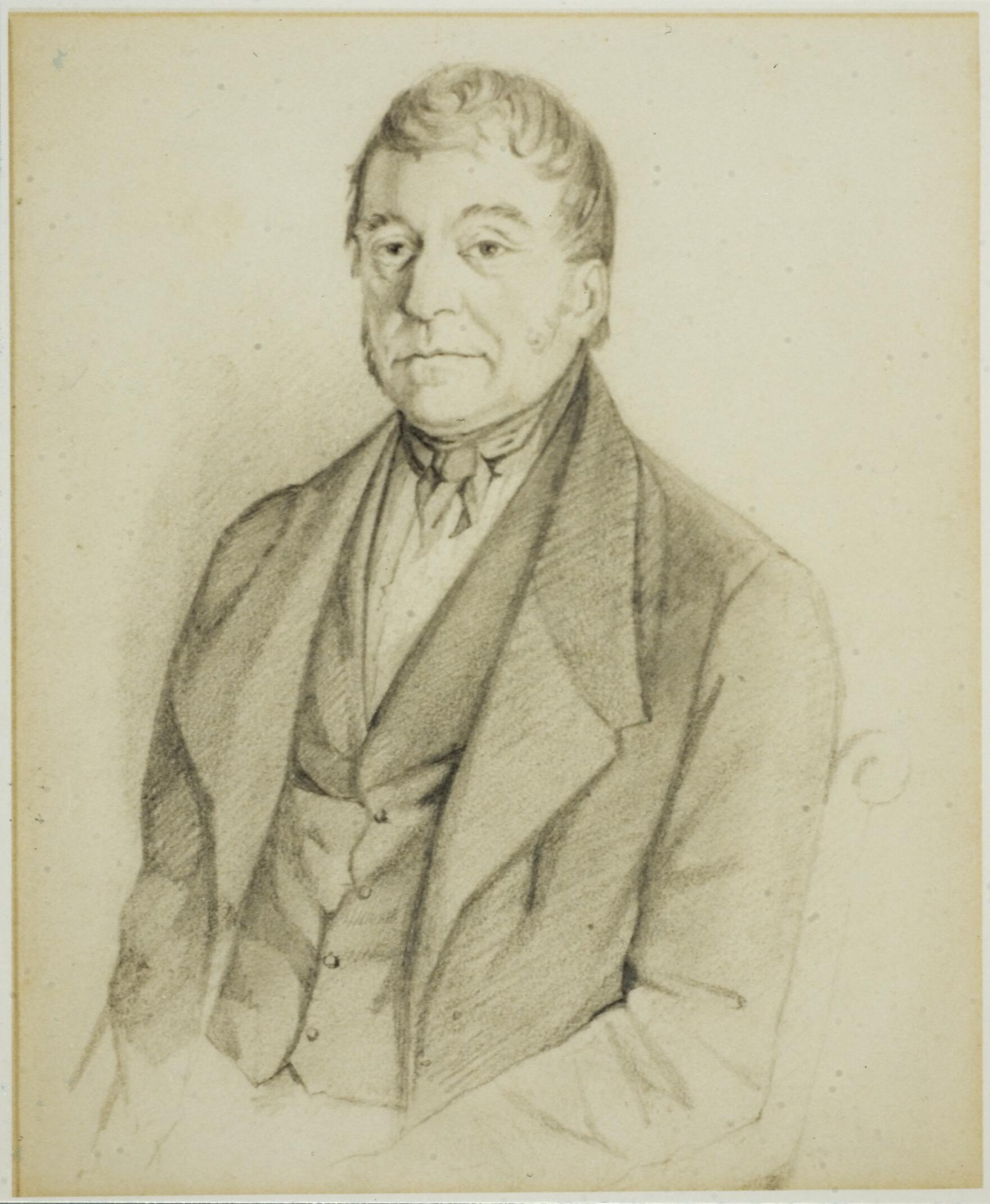 Portret van de predikant Pieter Boeles (1795-1875)